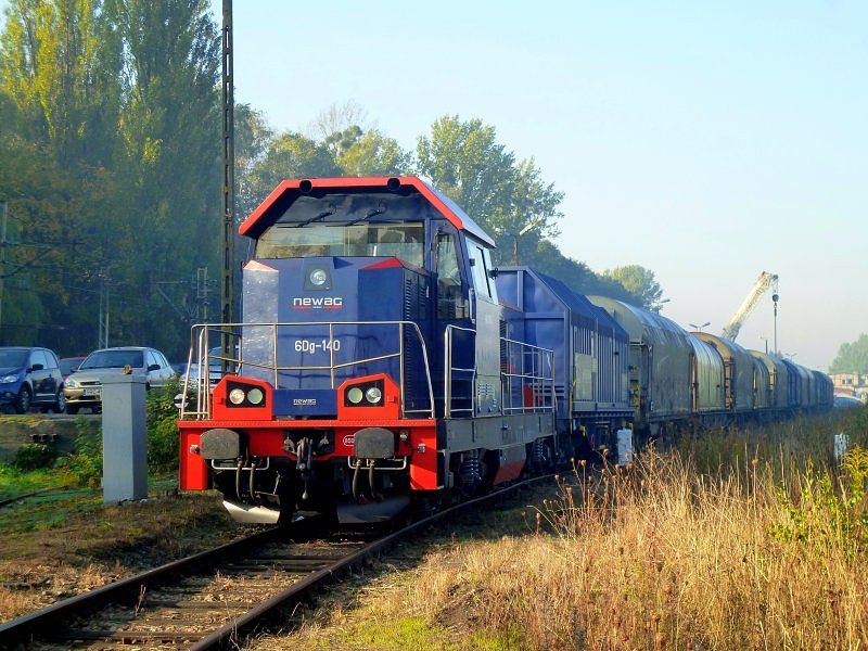 Zmodernizowany spalinowóz 6Dg-140 należący do Newagu i eksploatowany przez Lotos stoi przy rampie na stacji Rybnik.